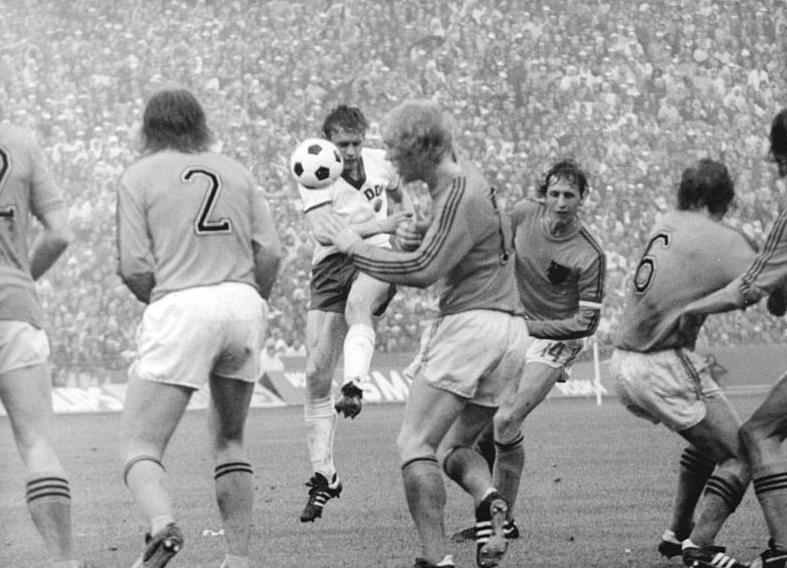 ADN-ZB-Mittelstädt-30.6.74-ma-BRD-Gelsenkirchen: X. Fußball-Weltmeisterschaft-2. Finalrunde, Gruppe A: DDR - Niederlande 0:2- DDR- Mannschaftskapitän Bernd Bransch (Hintergrund, Mitte) versucht mit einem Freistoß die niederländische Abwehrmauer zu überwinden. Von links: Nr.2 Arie Haan, Wim Rijsbergen, Johan Crayff und Nr.6 Wim Jansen.